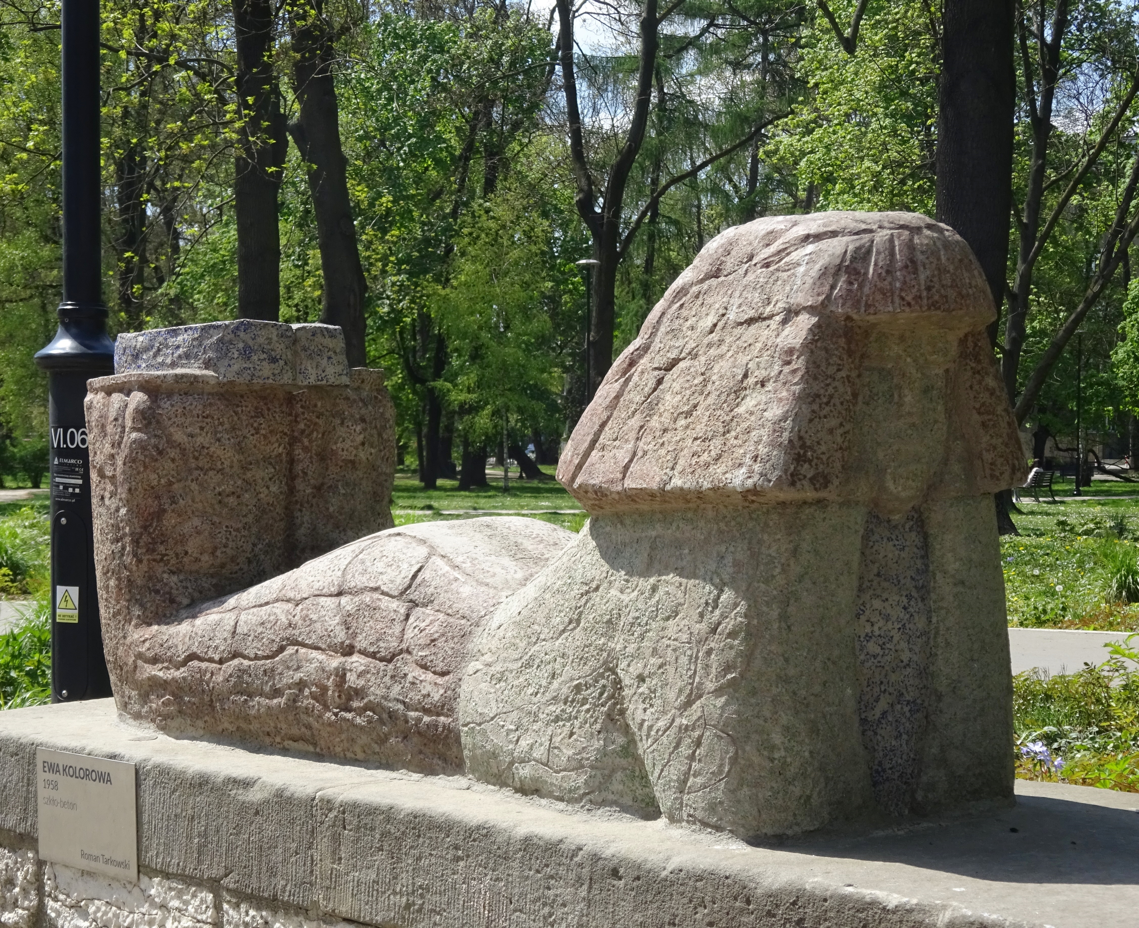 Rzeźba „Ewa Kolorowa”, autorstwa Romana Tarkowskiego z 1958 roku, znajdująca się w Parku Krakowskim w Krakowie.